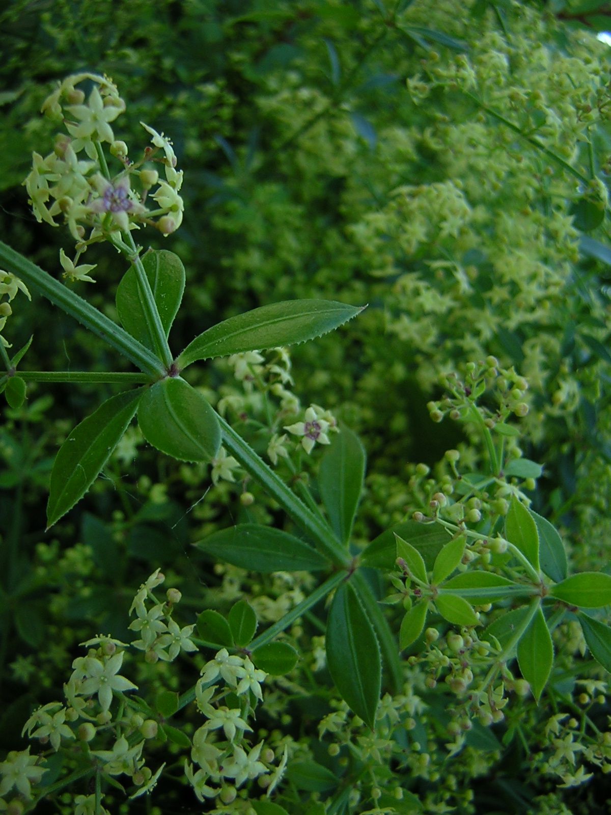 Rubia peregrina Ile d'Oléron, France Source : [1]